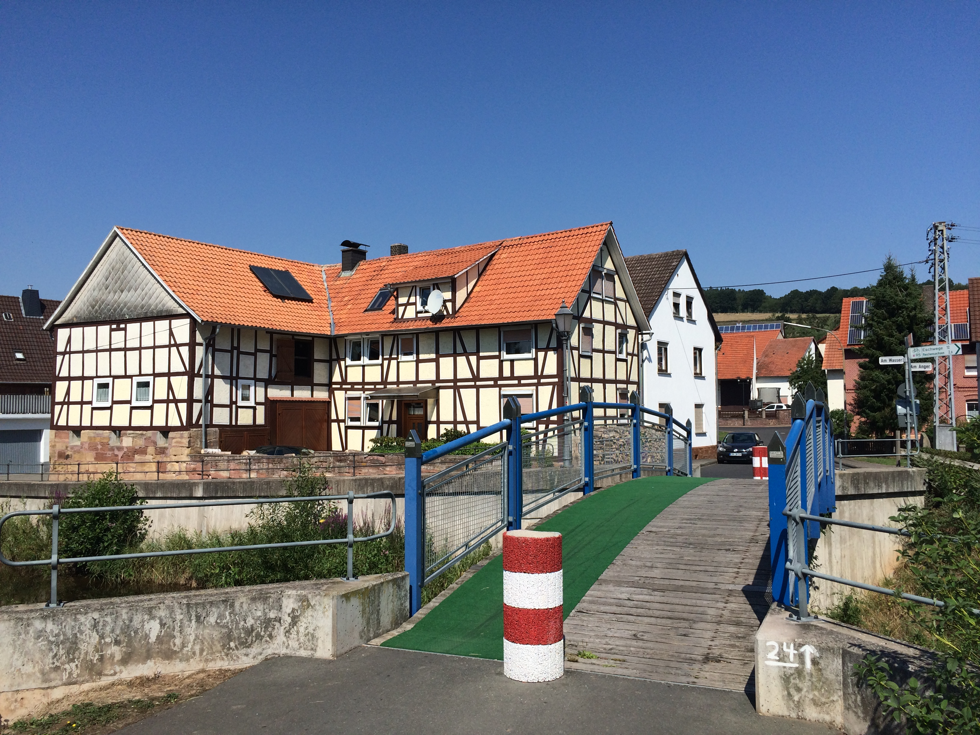 Der Hessische Radfernweg R5 zwischen Hoheneiche und Oetmannshausen; Brücke über die Ehre am südlichen Ende von Oetmannshausen